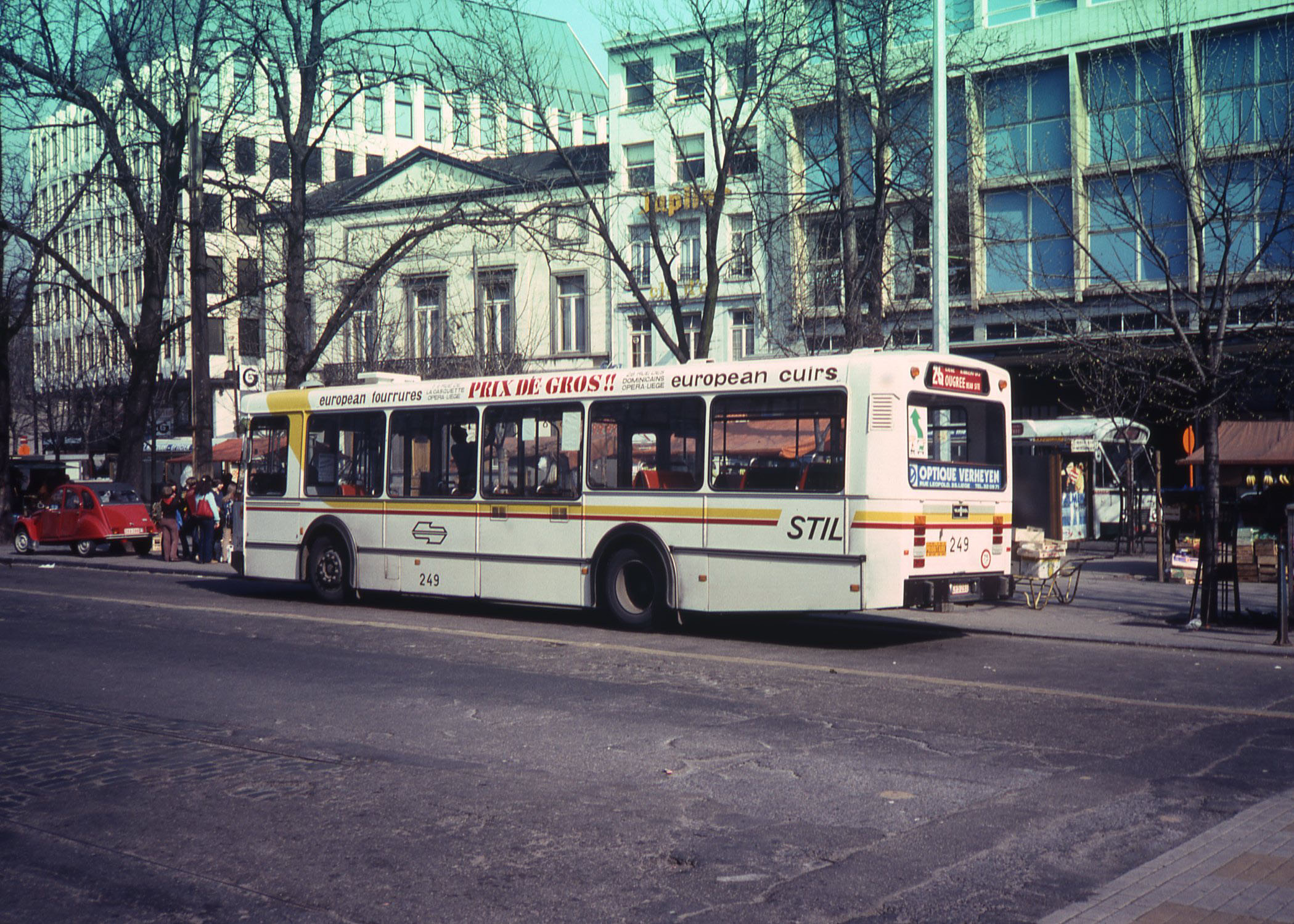 Bus de la STIL (Société des Transports Intercommunaux de Liège), compagnie des transports en commun de l'agglomération liégeoise, avant la création du TEC (Transport en Commun).